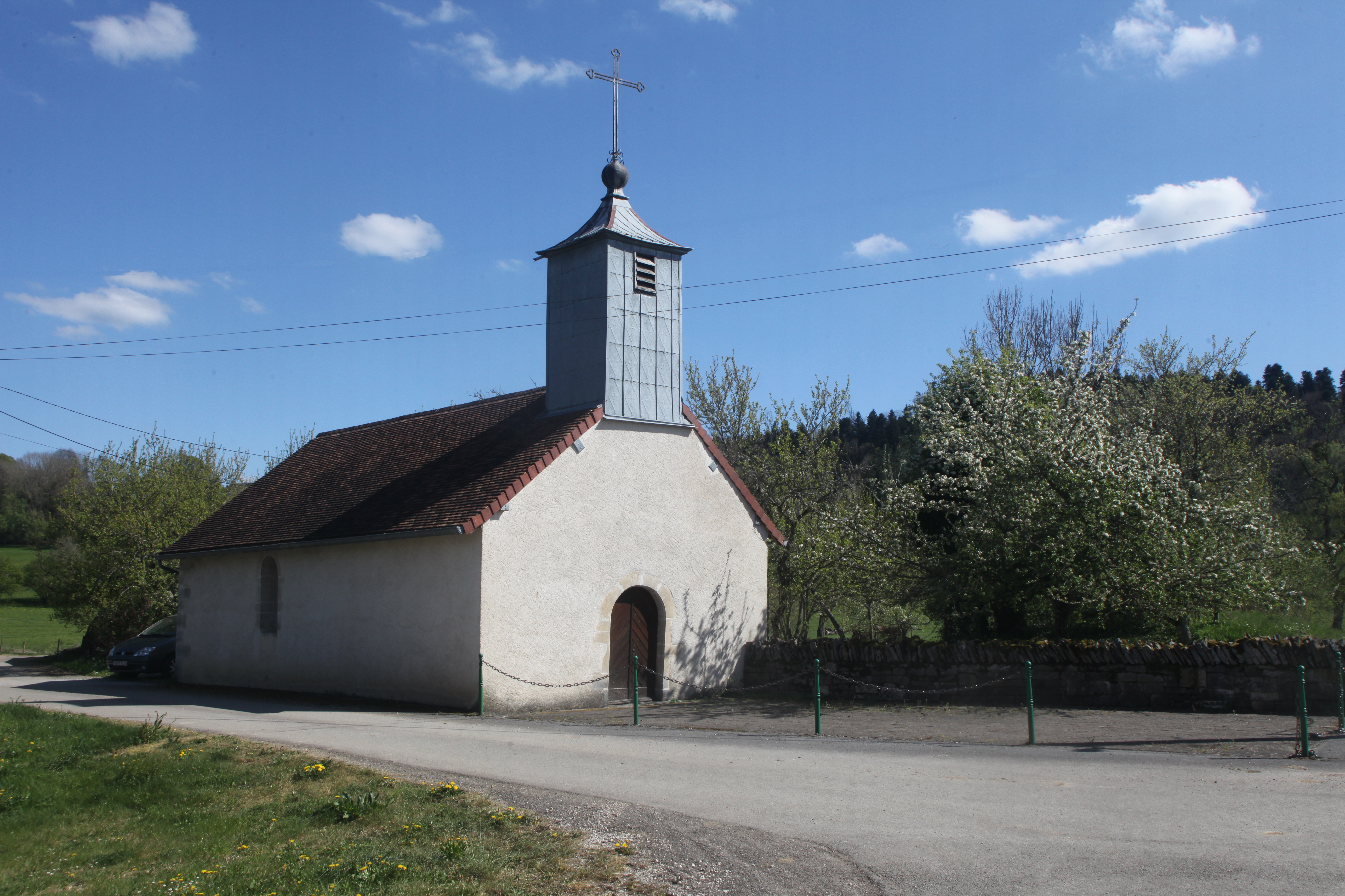 Chapelle de Saraz (Doubs).